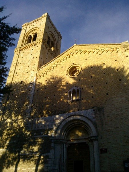 Santuario di San Severino - Duomo Antico This is a photo of a monument which is part of cultural heritage of Italy.